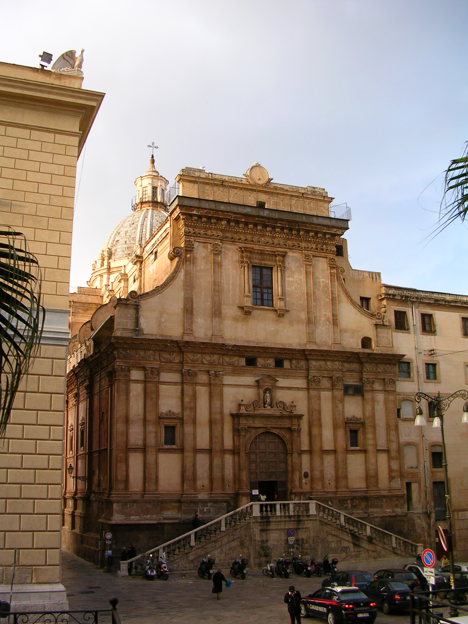 Chiesa di Santa Caterina - Palermo - Sicily - Italy